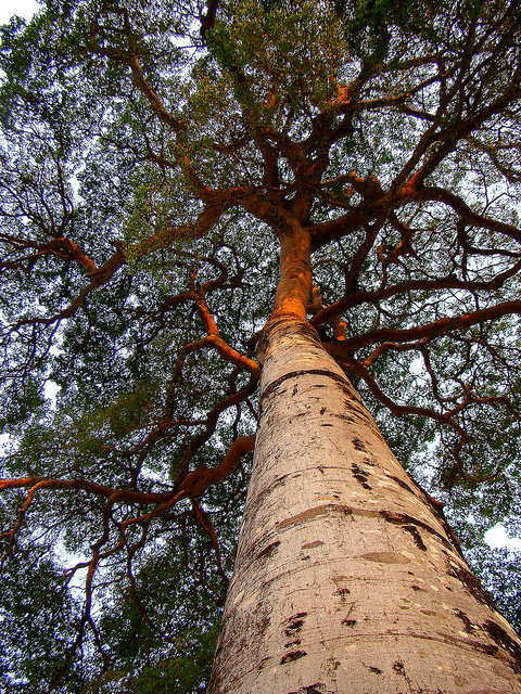 jatoba centenario em mococa sao paulo